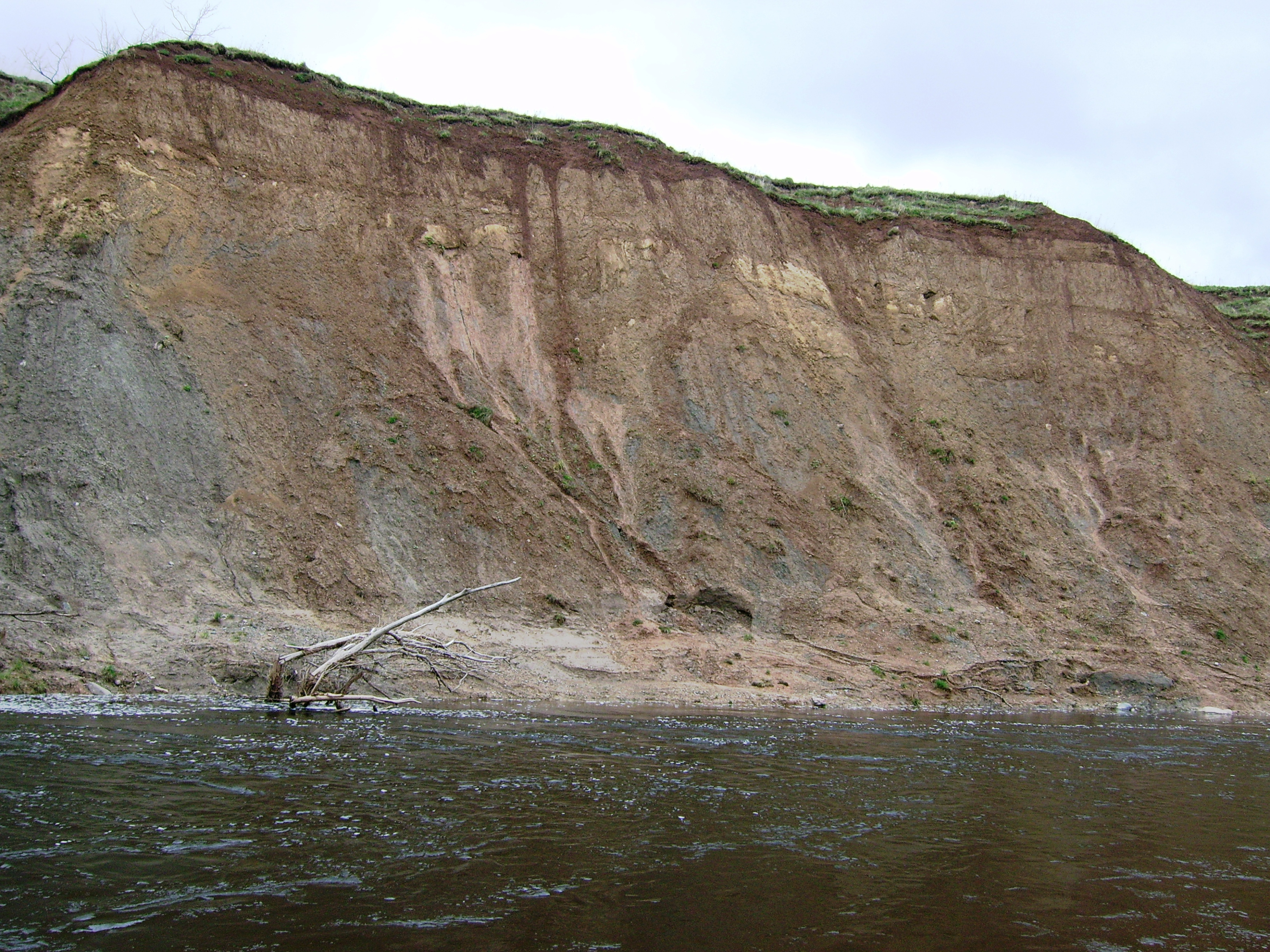 Rekstukų atodanga